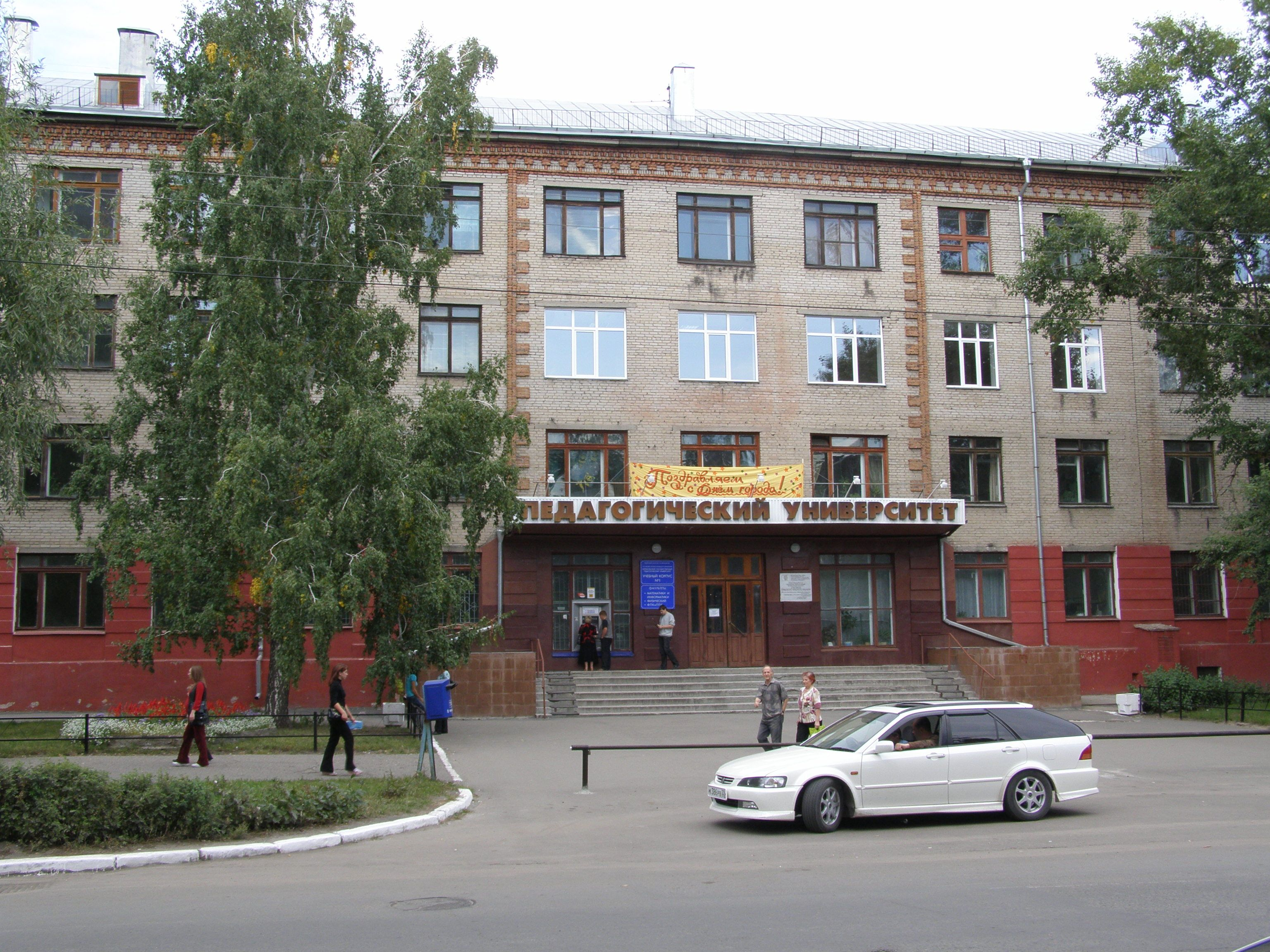 Барнаульский педагогический университет. Учебный корпус №1 ("старый корпус")